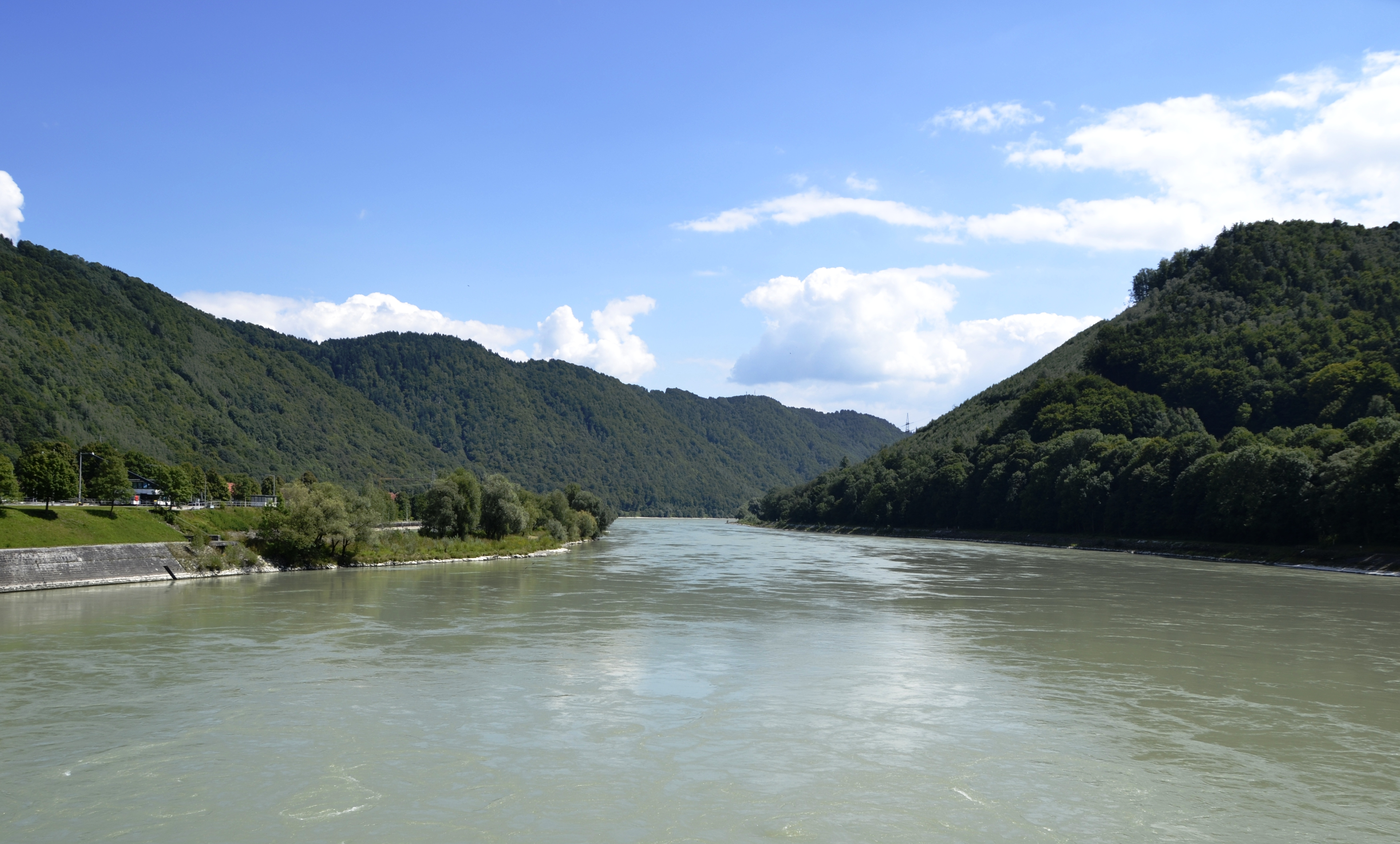 Das Donautal an der österreich-deutschen-Grenze unterhalb des Kraftwerks Jochenstein.